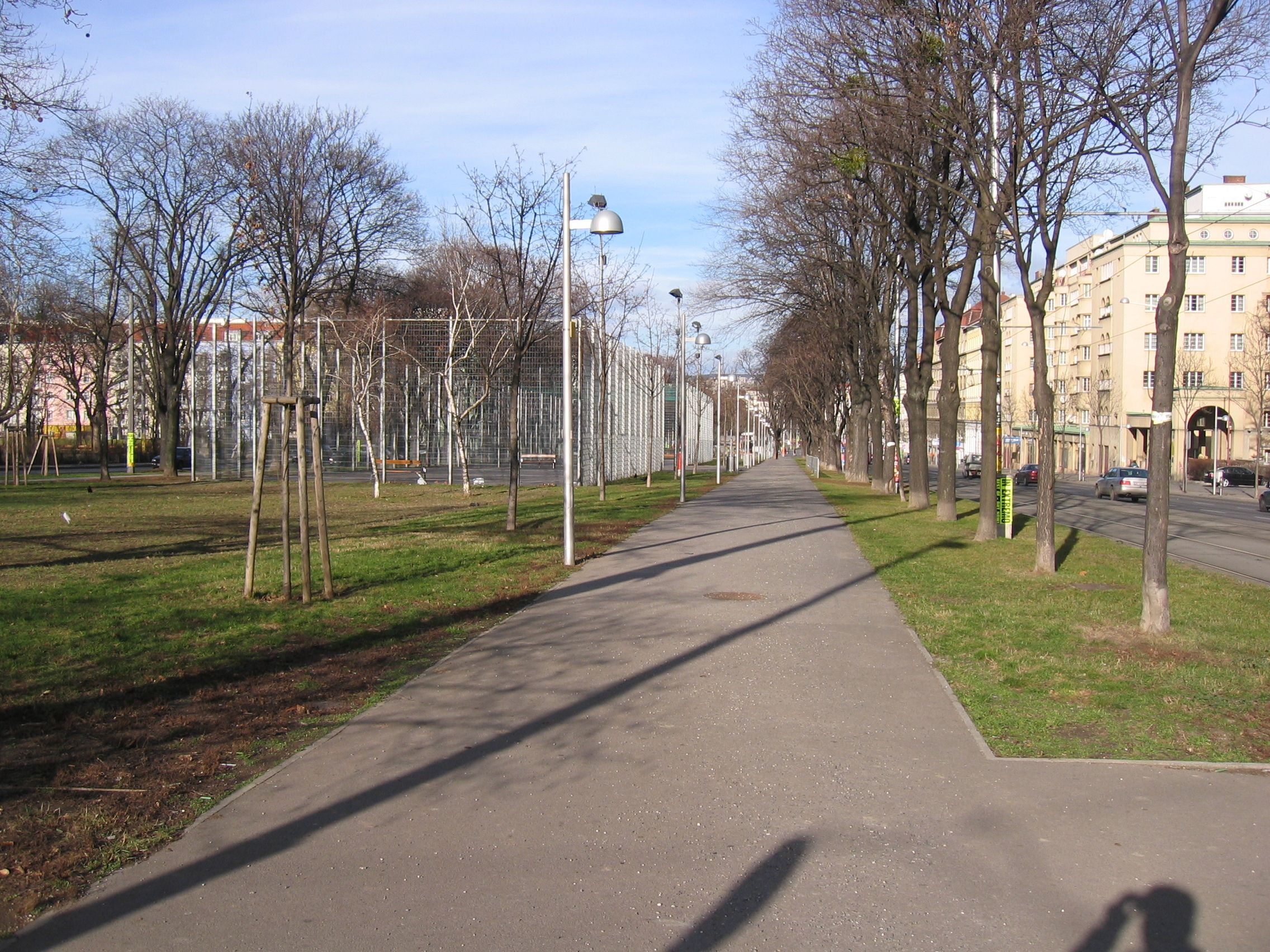 Grüngürtel am Margaretengürtel (Blickrichtung Norden): Rechts die Häuserfront des Margaretengürtels (= Fahrtrichtung Norden und Gleiskörper der Straßenbahnlinien 6 und 18) im 5. Bezirk, links hinten die des Gaudenzdorfer Gürtels (= Fahrtrichtung Süden) im 12. Bezirk. Im überbreiten Mittelstreifen sollte ursprünglich, wie auf dem Westgürtel, ein Ast der Wiener Stadtbahn errichtet werden; später wurde er zum Gürtelpark ausgebaut.